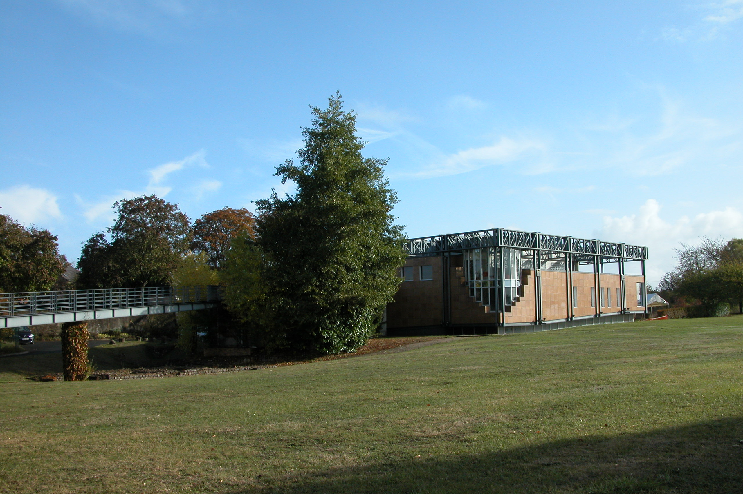 Vue générale du Musée Argentonmagus à Saint-Marcel (Indre)